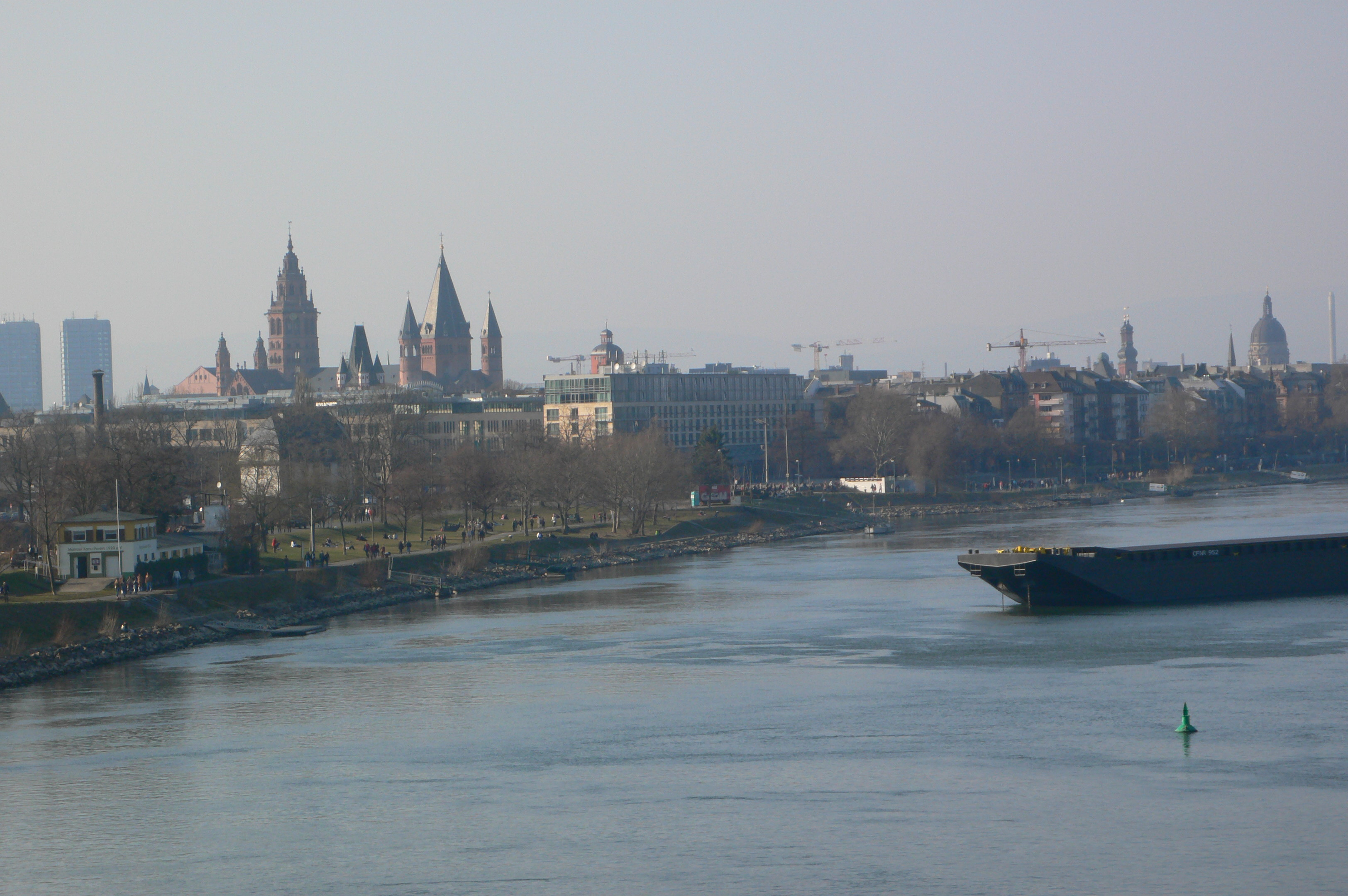 Blick auf das Mainzer Rheinufer und die Innenstadt von der Eisenbahnbrücke Mainz-Süd. Von links nach rechts die Bonifazius-Türme, der Dom und die Christuskirche